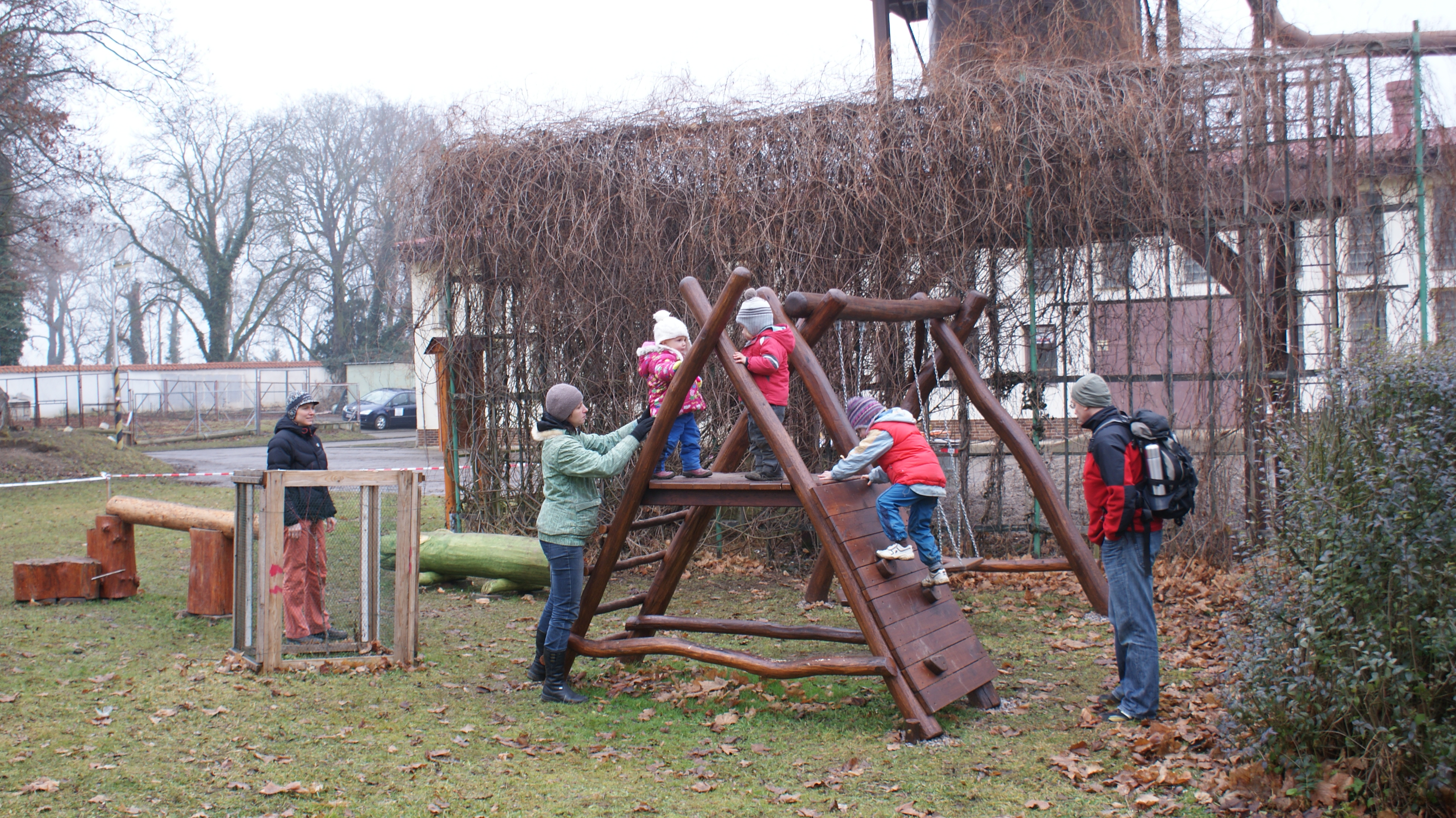 Zimní běh Litní - nejmenší na hřišti naučné stezky 18. 1. 2014